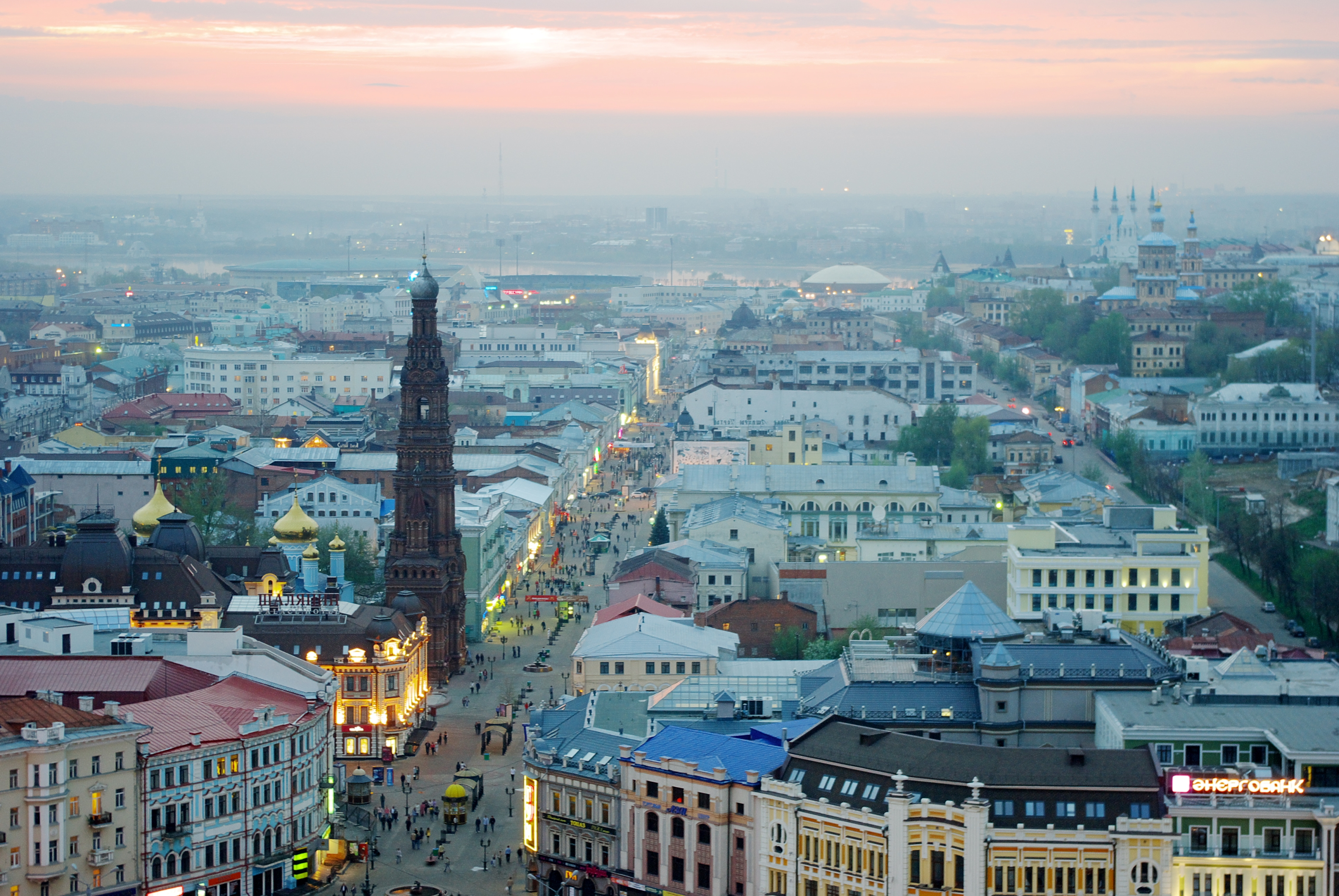 Kazan, Baumana street